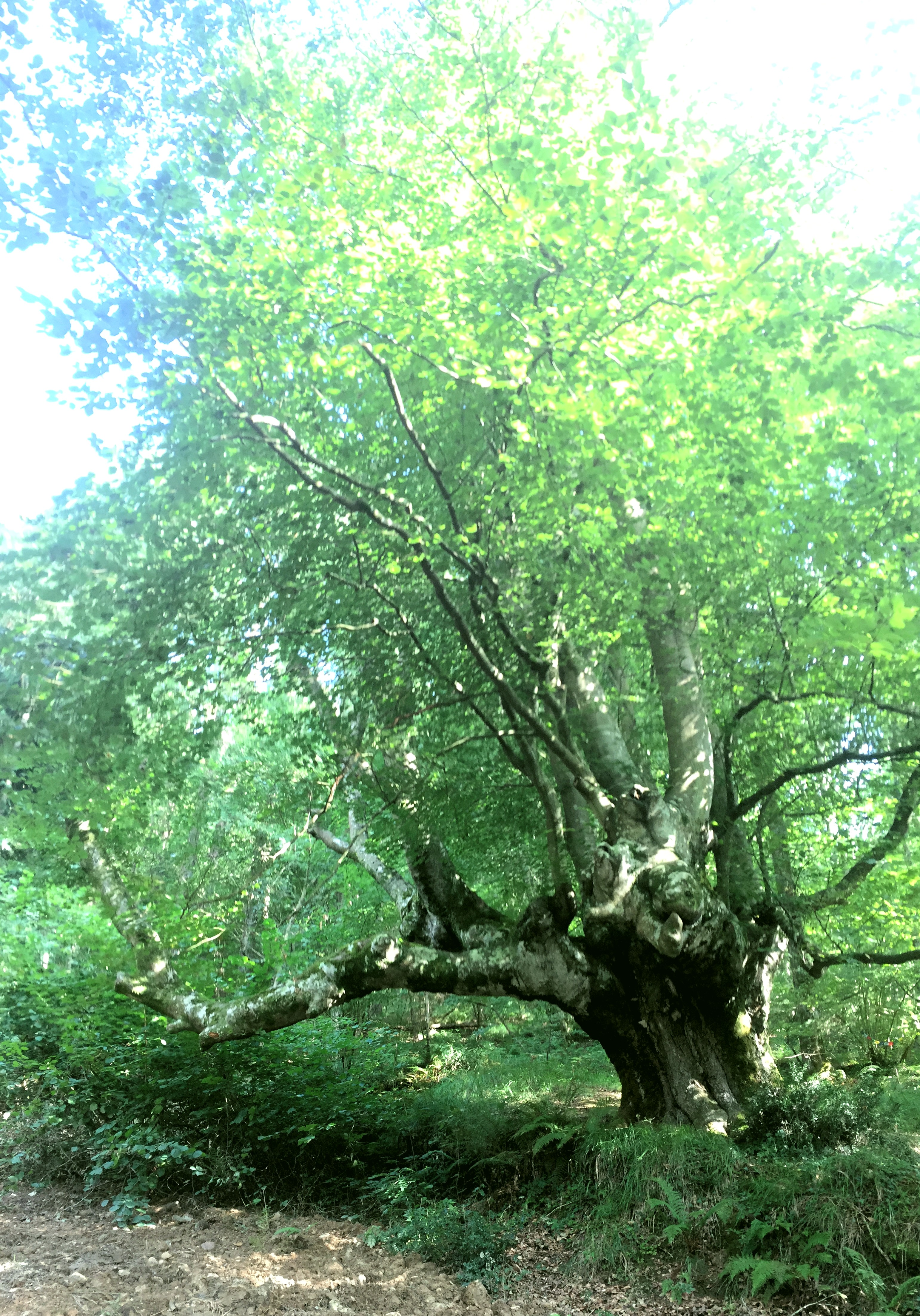 Altzoko pagoa